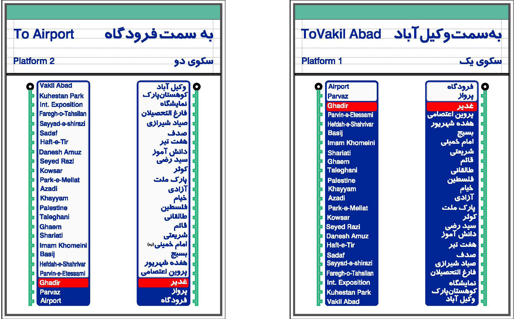 نقشه پیکتوگرام خط یک مترو مشهد